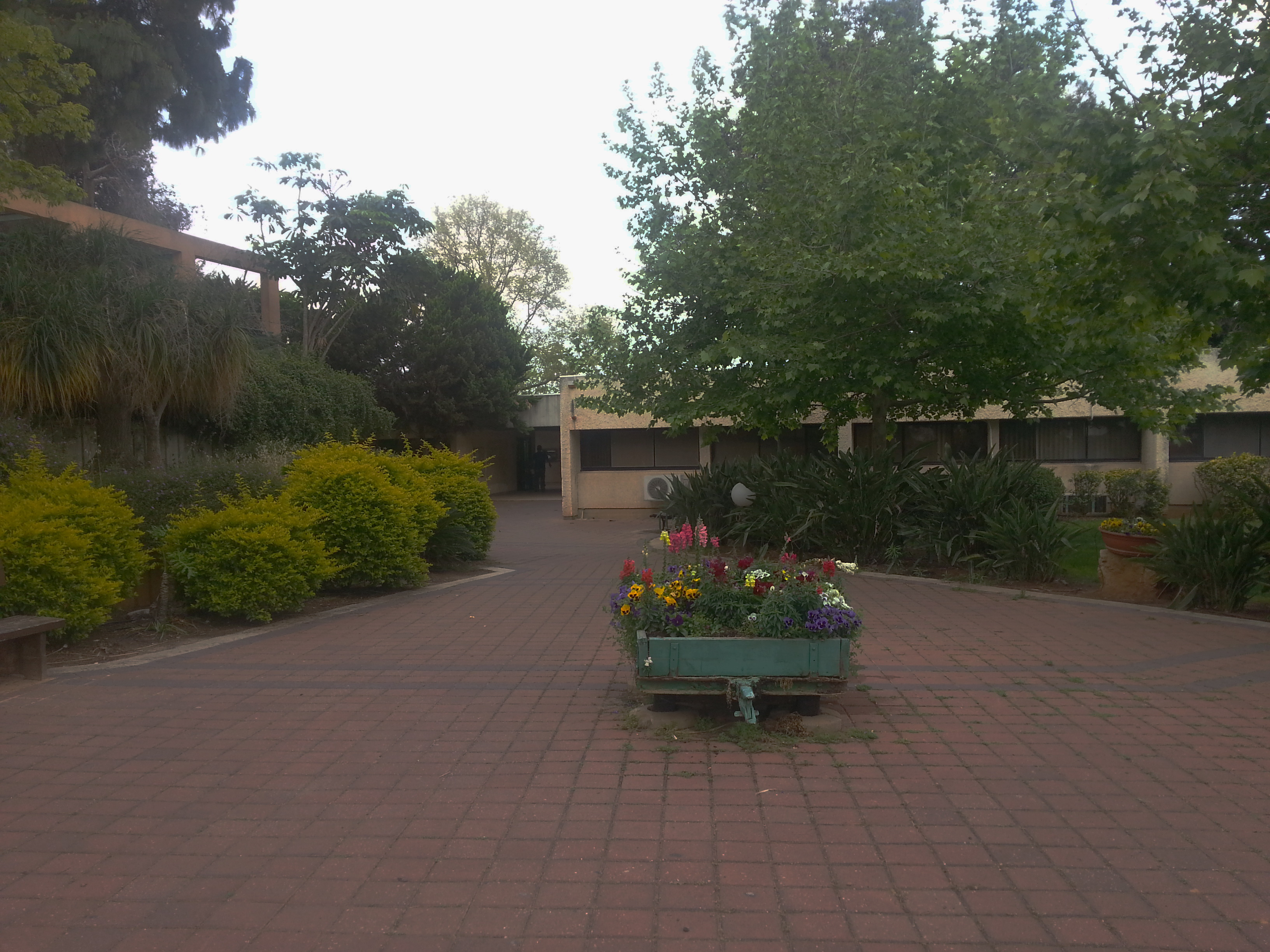 מזכירות הקיבוץ מתחת למועדון החברים